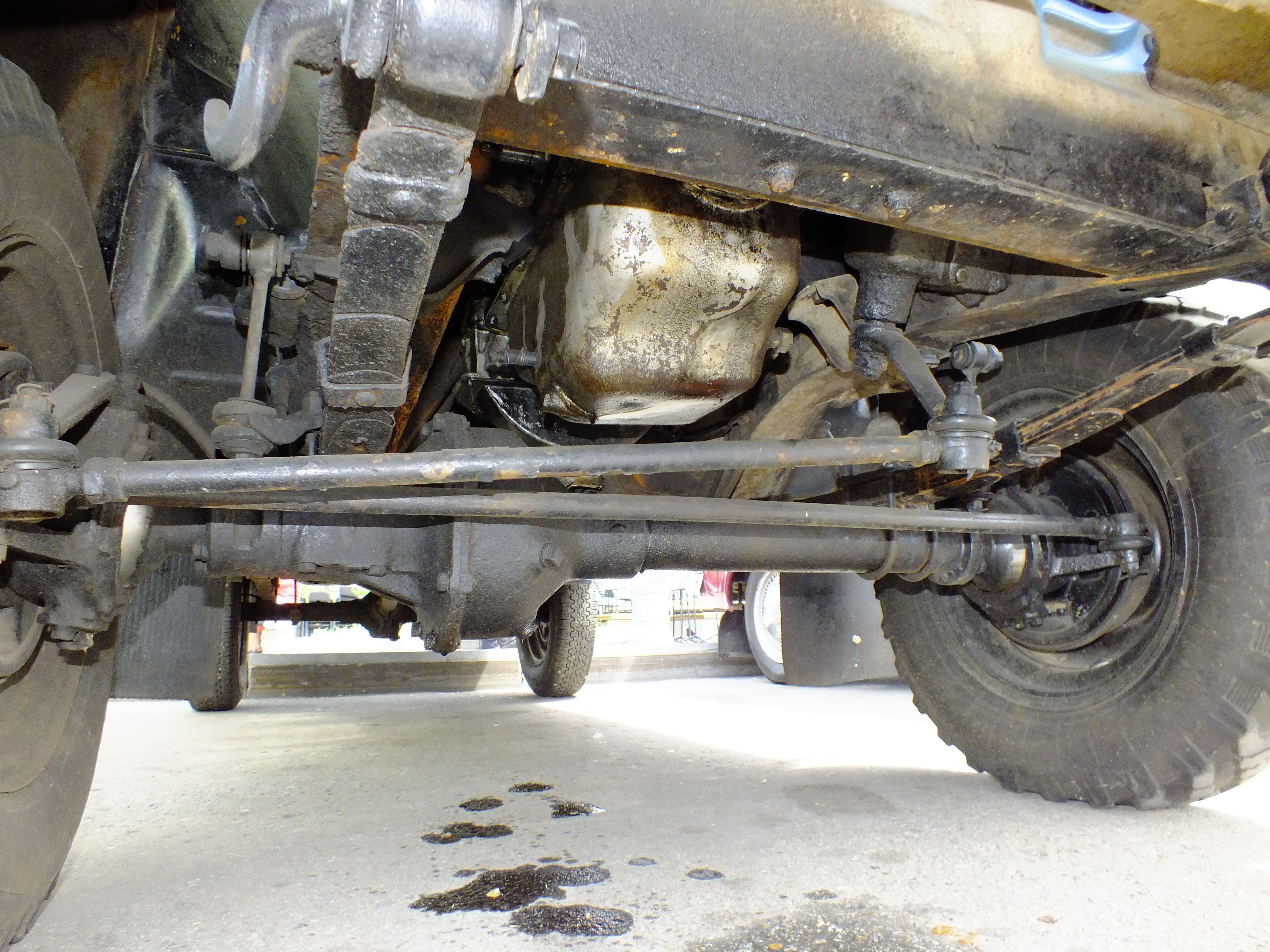 Moskvich 410